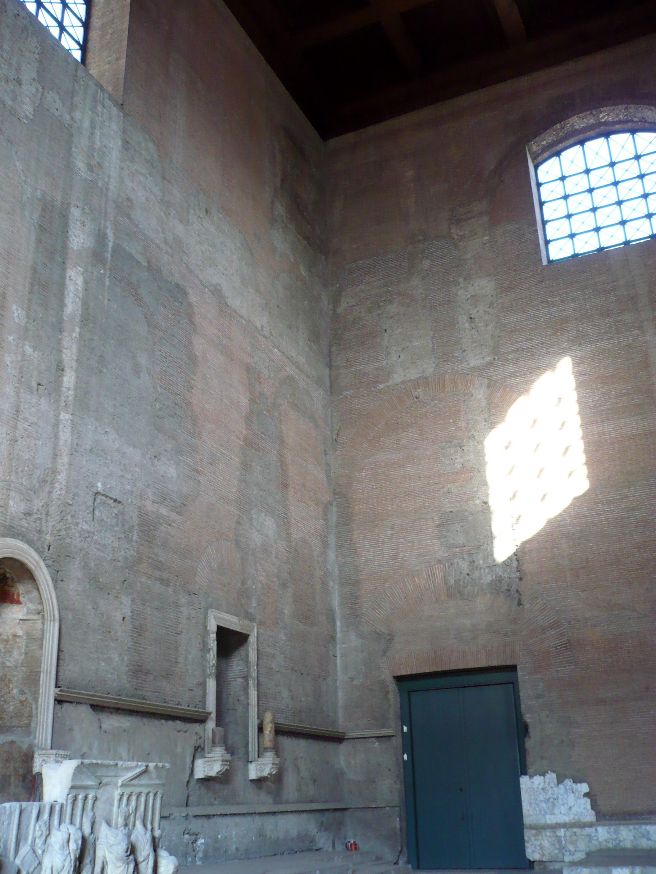 l'interno della Curia Iulia, l'edificio in cui si riuniva il Senato, nei Fori imperiali di Roma, Italia.